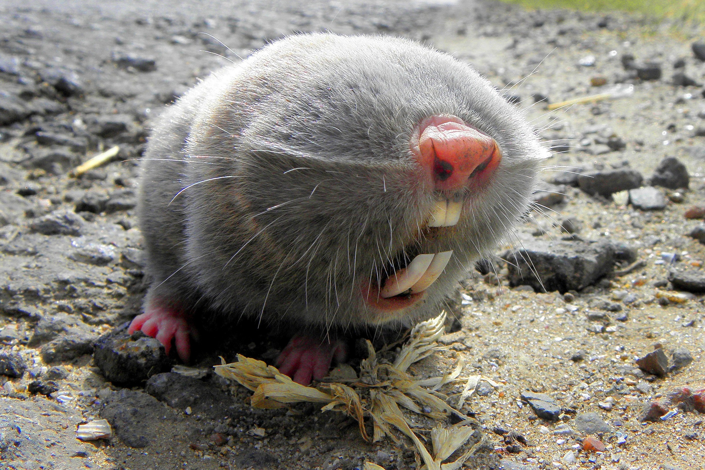 Дунайський біосферний заповідник, Кілійський р-н, м. Вилкове, вул. Татарбунарського повстання, 132 а